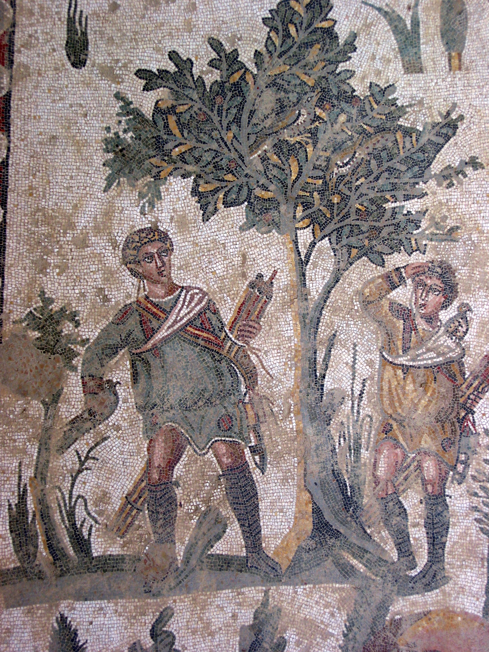 Villa Romana del Casale, Piazza Armerina, Sicily/Sicilia, Italy/Italia